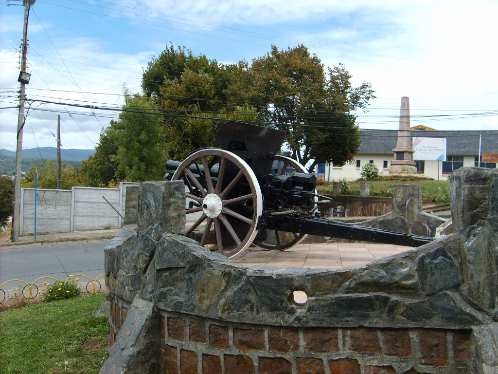 Cañón Krupp, Utilazado en la guerra del pacific